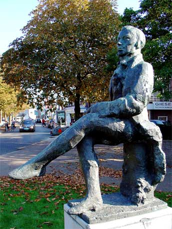 Standbeeld van de dichter A.C.W. Staring in Vorden, gemaakt door de beeldhouwer F.T.S. Letterie.